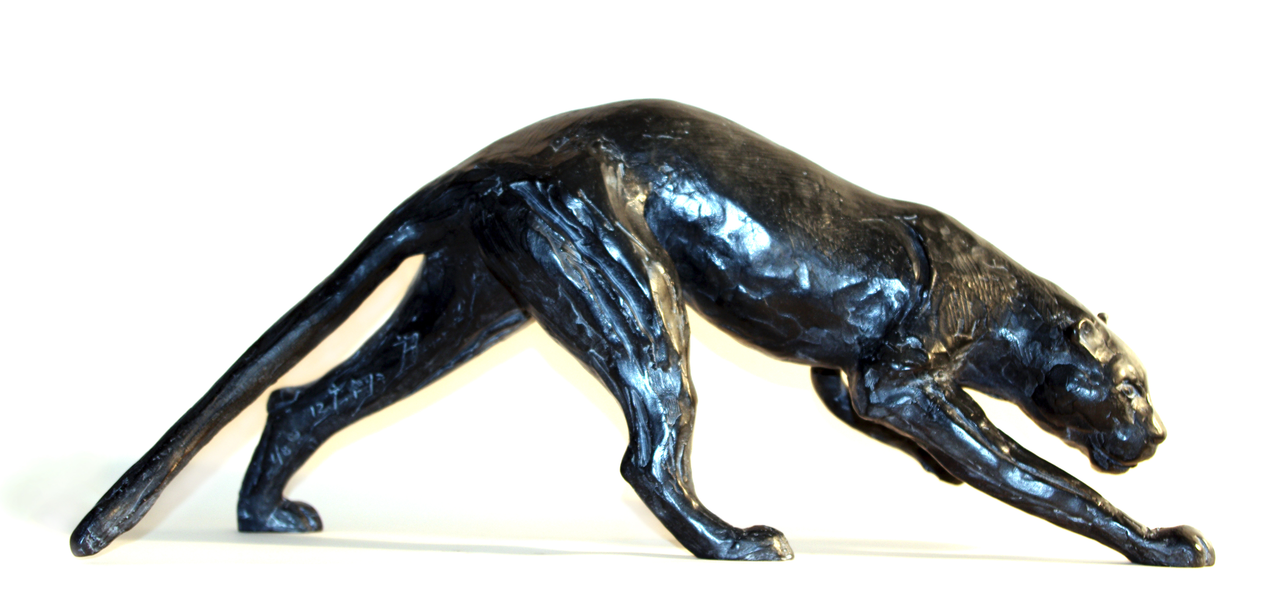 Bronze à la cire perdue